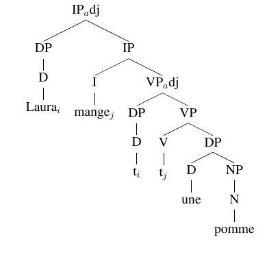 Dérivation de la phrase "Laura mange une pomme" selon les principes de l'antisymétrie de Kayne.